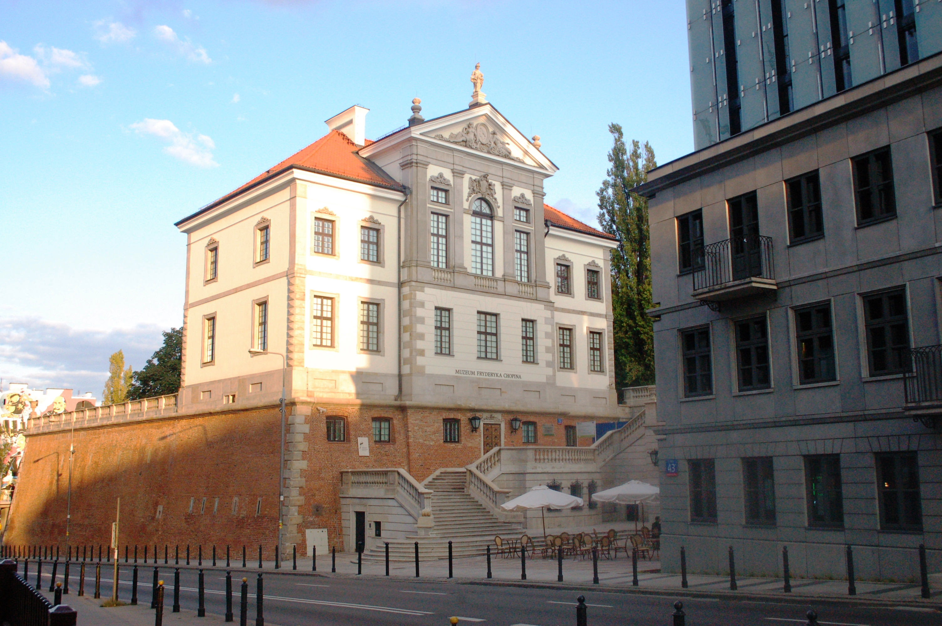 Warschau